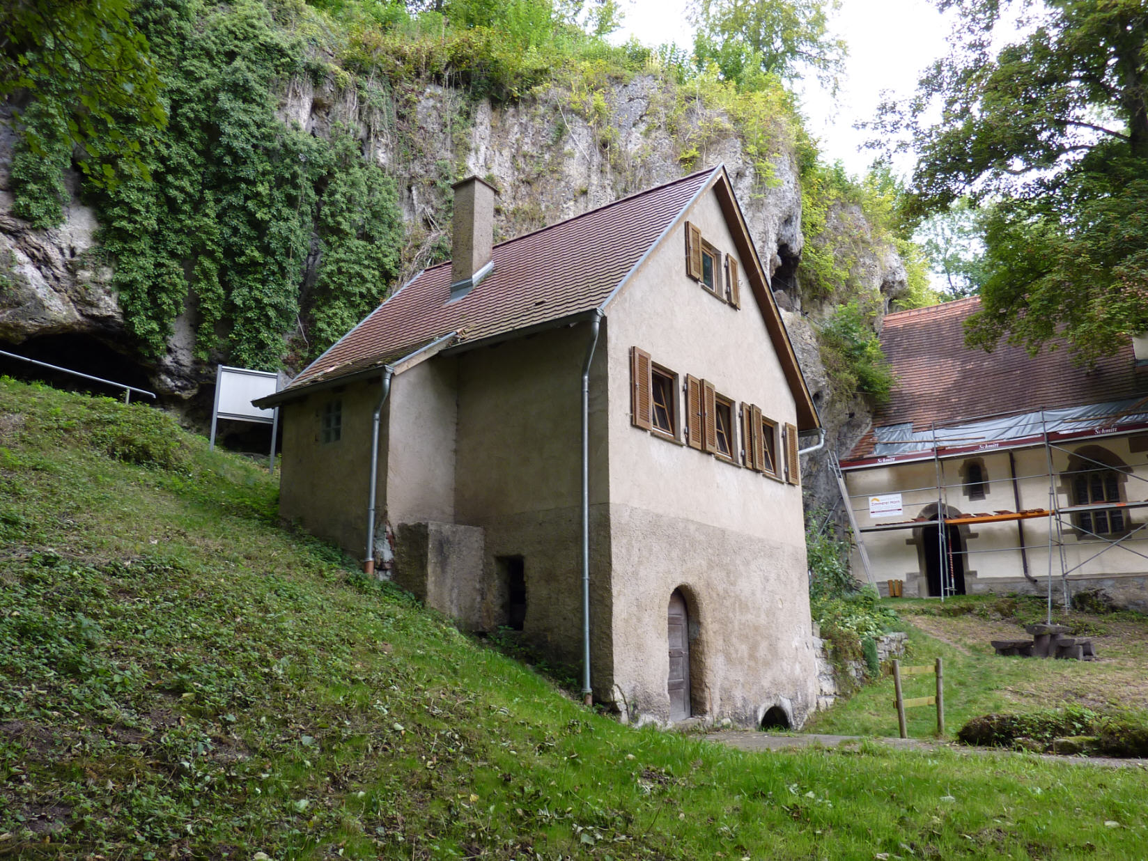 Brunnen/Mesnerhaus von St. Wendel zum Stein